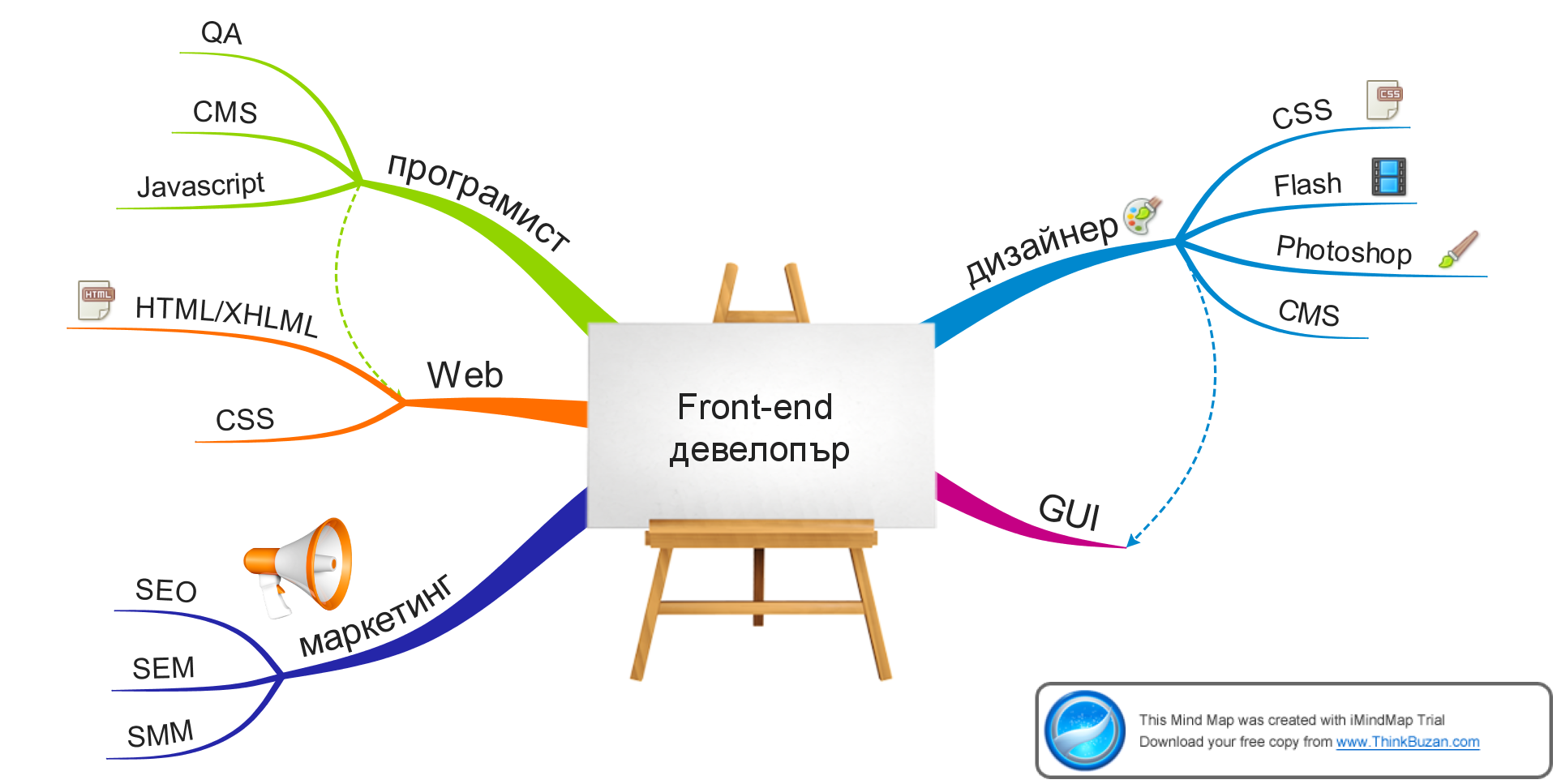 front-end разтаботчик - Мисловна карта